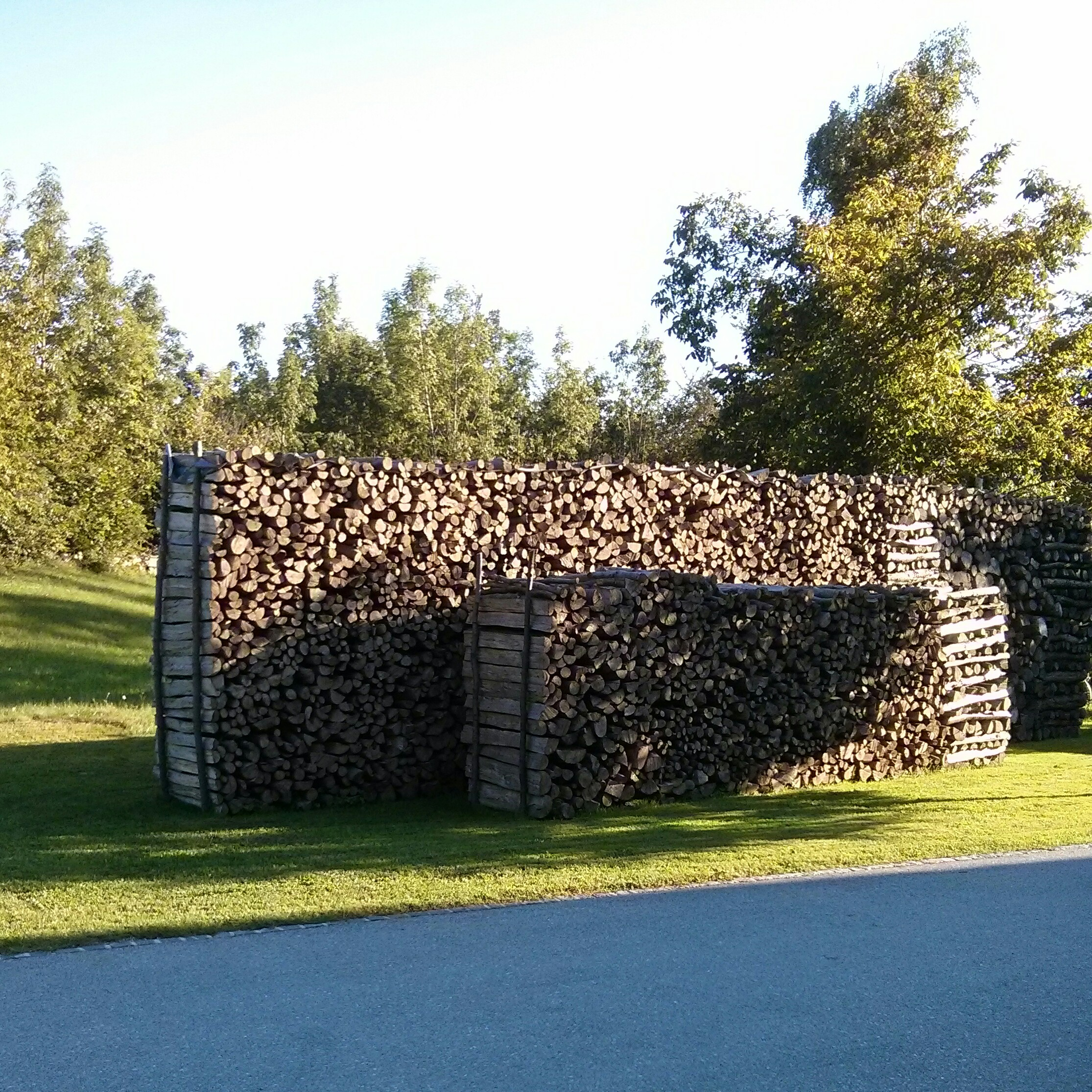 IMG_20140808_224522